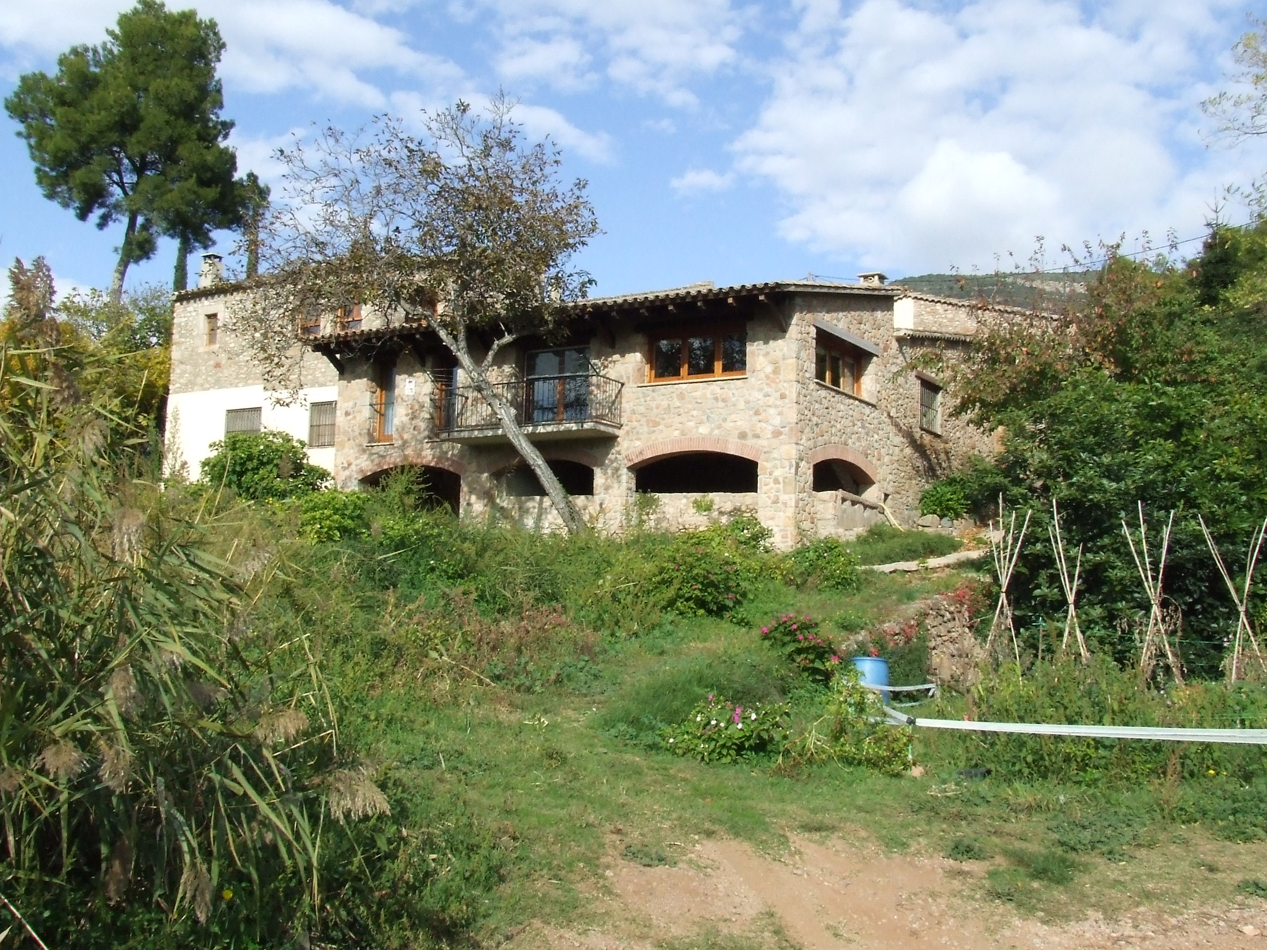 El Regassol (Riells del Fai, Bigues i Riells, Vallès Oriental)